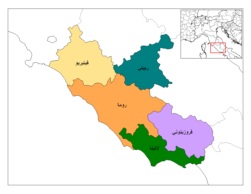 مقاطعات لاتسيو